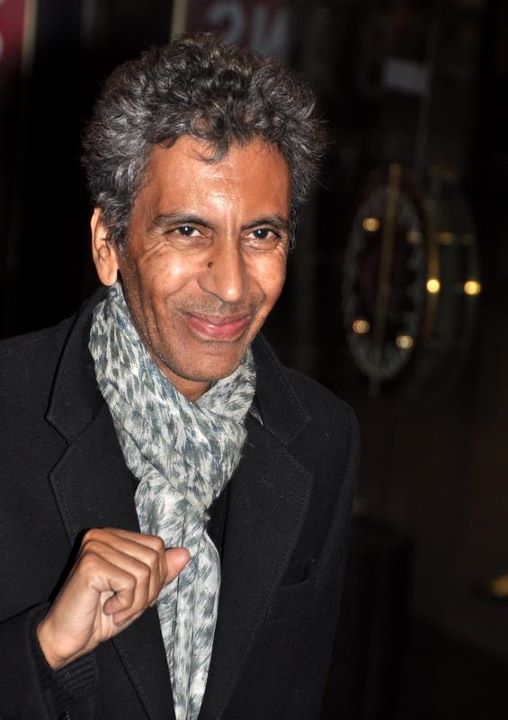 Rachid Bouchareb à l'avant-première du film Carnage